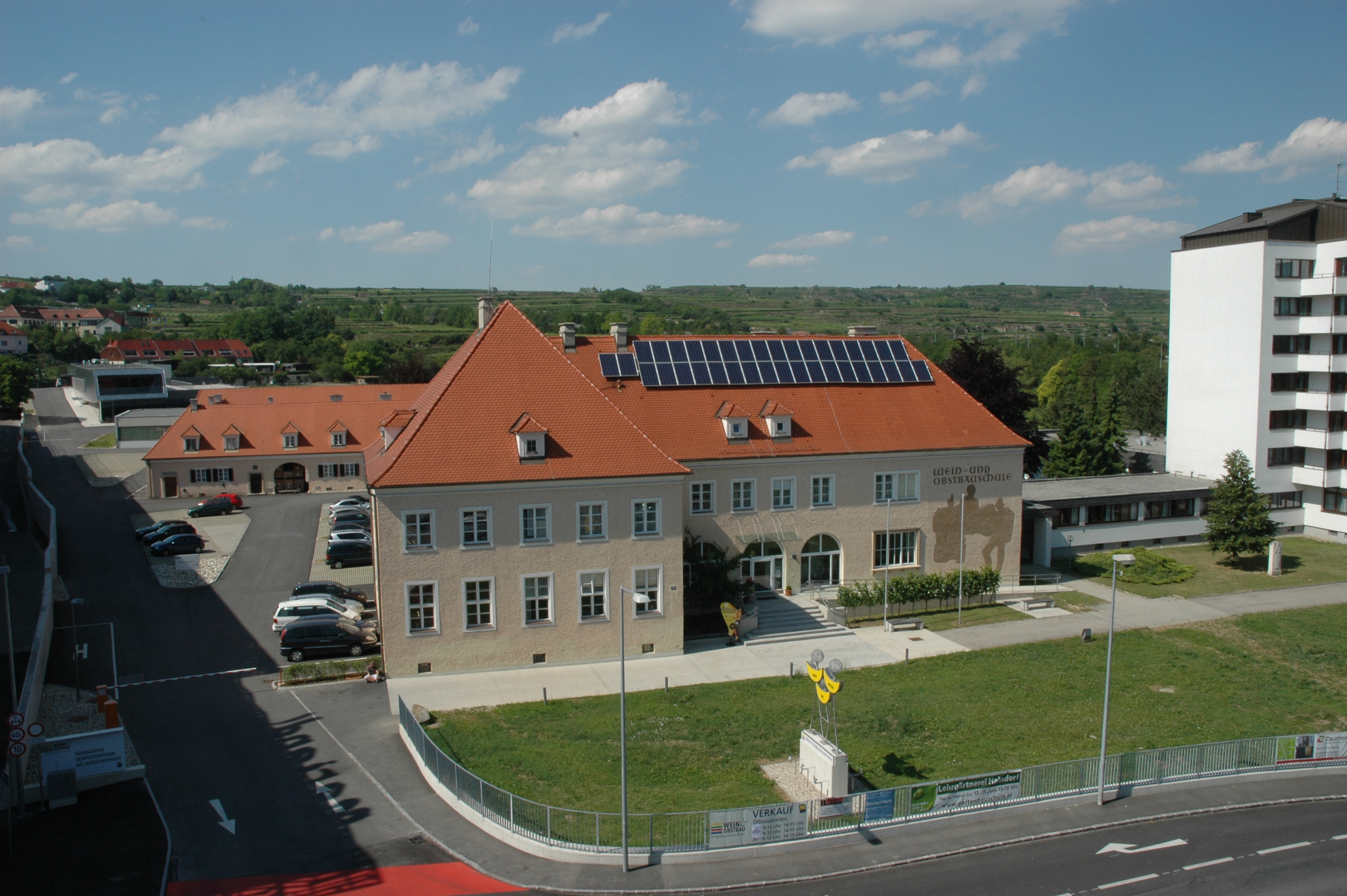 Gesamtansicht der Weinbauschule Krems, ab 1950 aus Mitteln des Landes Niederösterreich und des Marshallplanes errichtet.